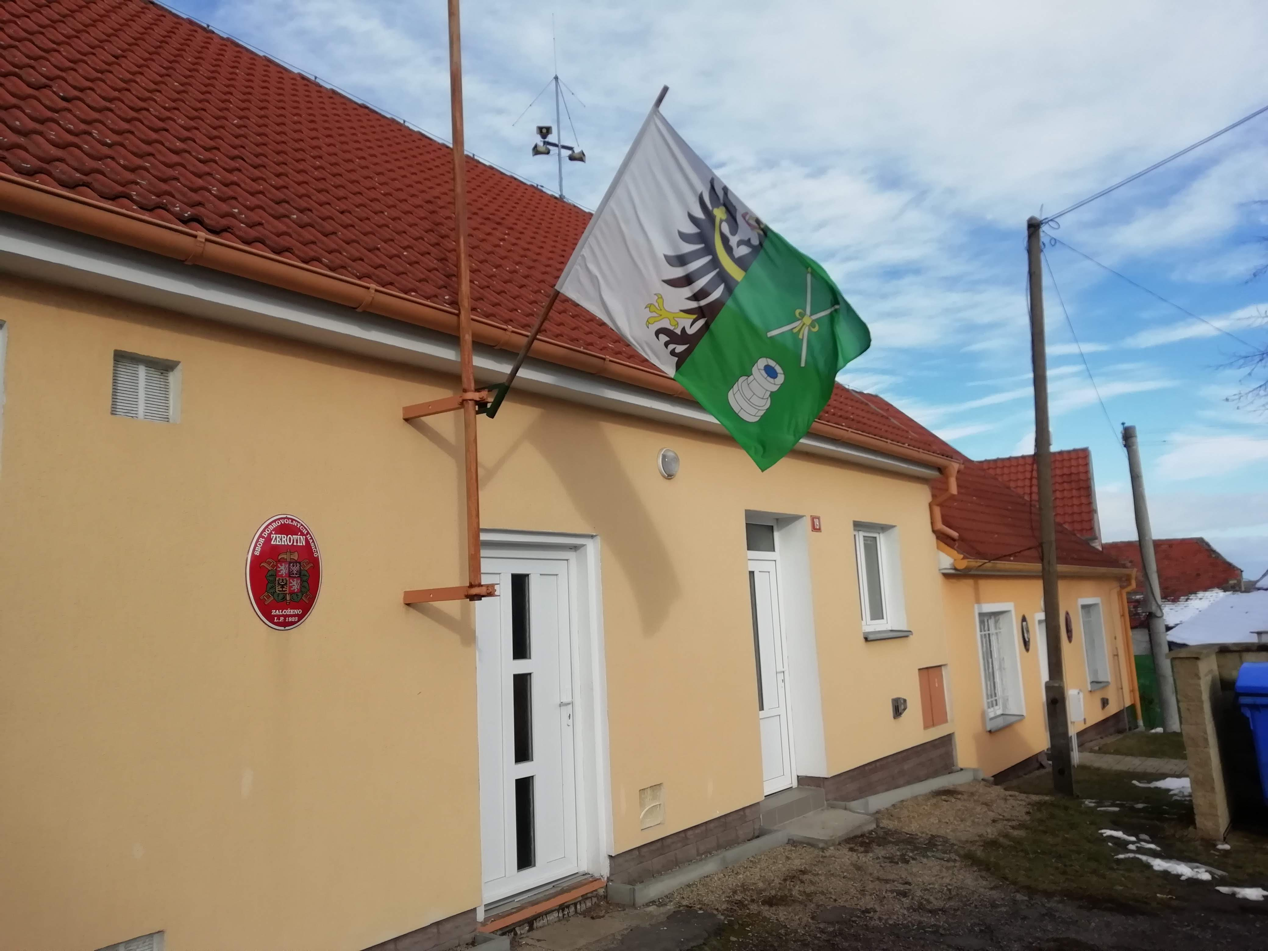 Vlajka obce vlající na budově Sdružení dobrovolných hasičů Žerotín, okres Louny